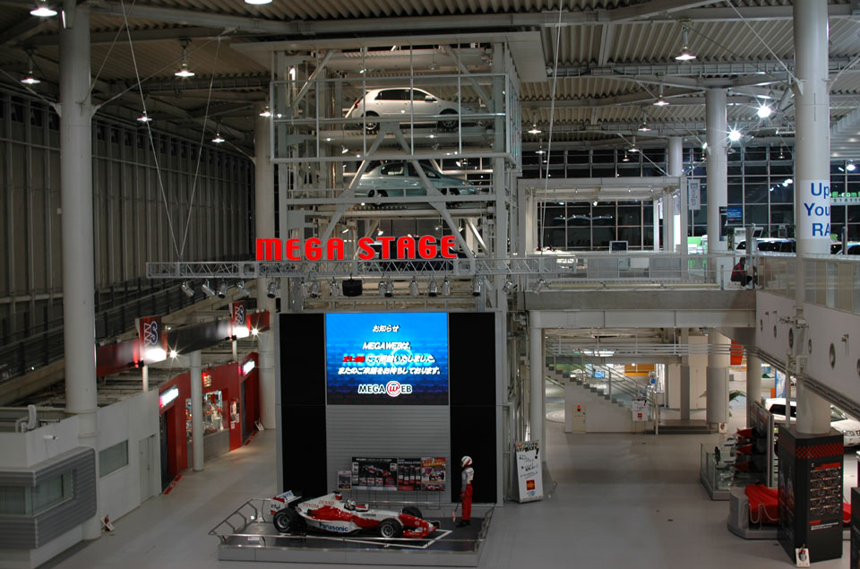 位於台場的豐田汽車館（MEGA WEB）館內一景 豐田汽車館（MEGA WEB）是豐田汽車在台場地區設立的大型室內展覽館，主要包括了歷史車庫（History Garage）、城市展示間（City Showcase）與未來世界（Future World）三個部分，分別代表豐田汽車對於過去、現在與未來三個階段的看法。遊客可以在館內親自操作或乘坐各型豐田汽車，進行最直接的互動與體驗。